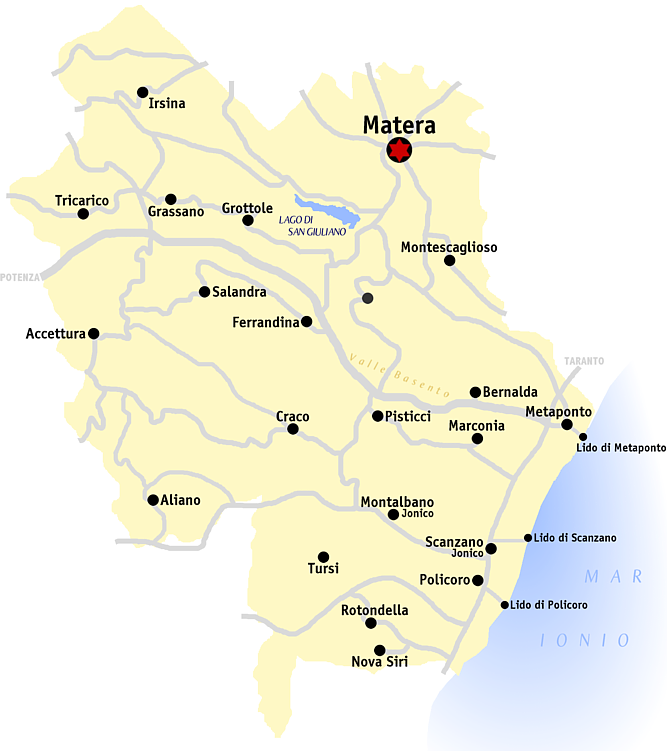 Kaart van de provincie Matera